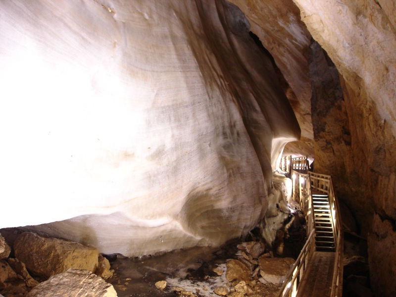 Dobšinská Ice Cave, Slovakia